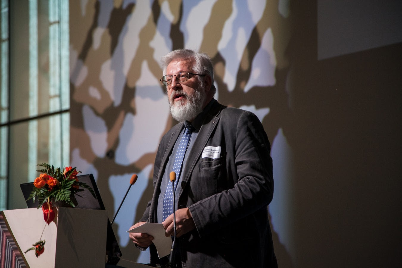 Eesti Teaduste Akadeemia president Tarmo Soomere 2016. aasta teaduskommunikatsiooni konverentsil.